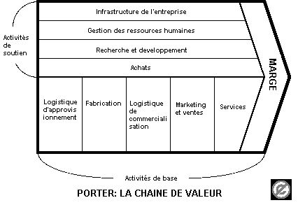 schéma de la chaine de valeur. Je (Milanku) suis l'auteur de ce schéma, les droits sont donc dans le domaine public.